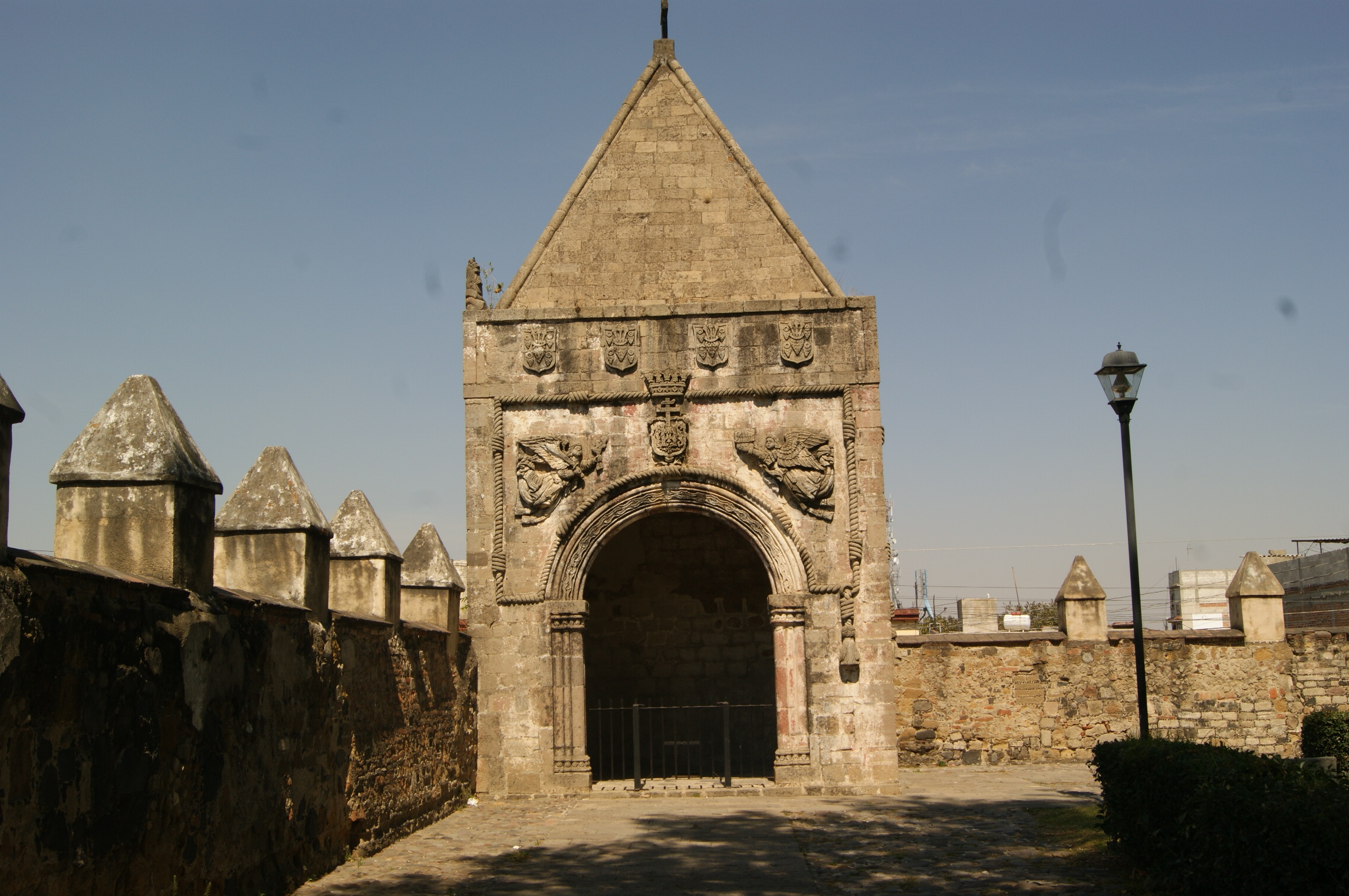 Convento de San Miguel Arcángel en Huejotzingo, Puebla